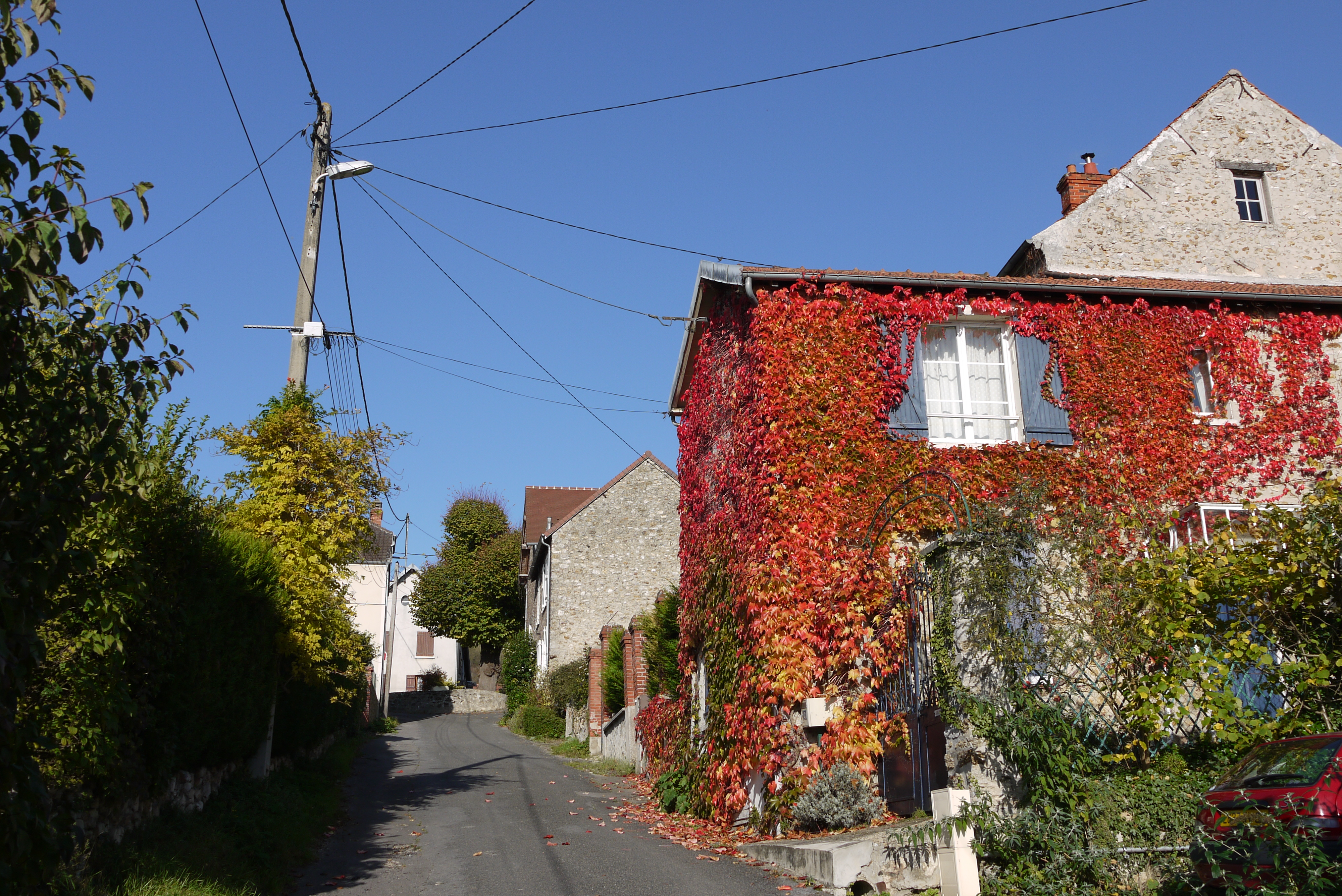 Chartèves, rue de la Bottelerie